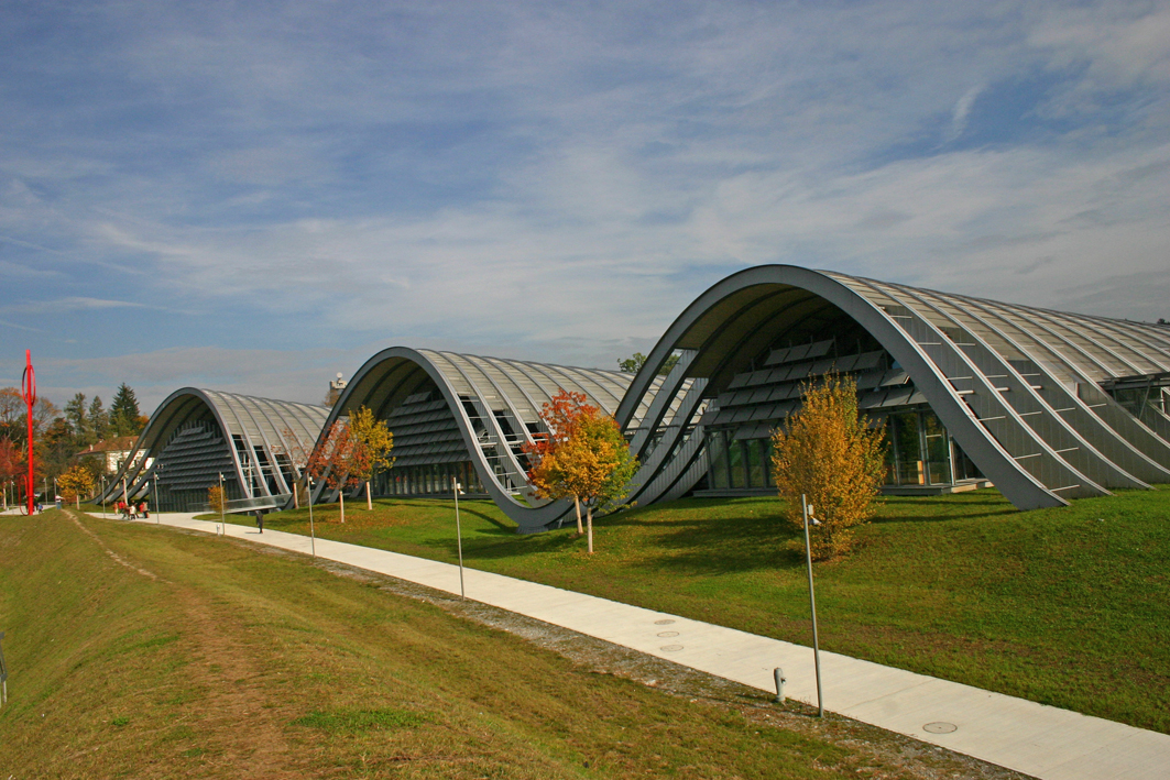 Frontansicht des Paul Klee Zentrums, Bern, Schweiz